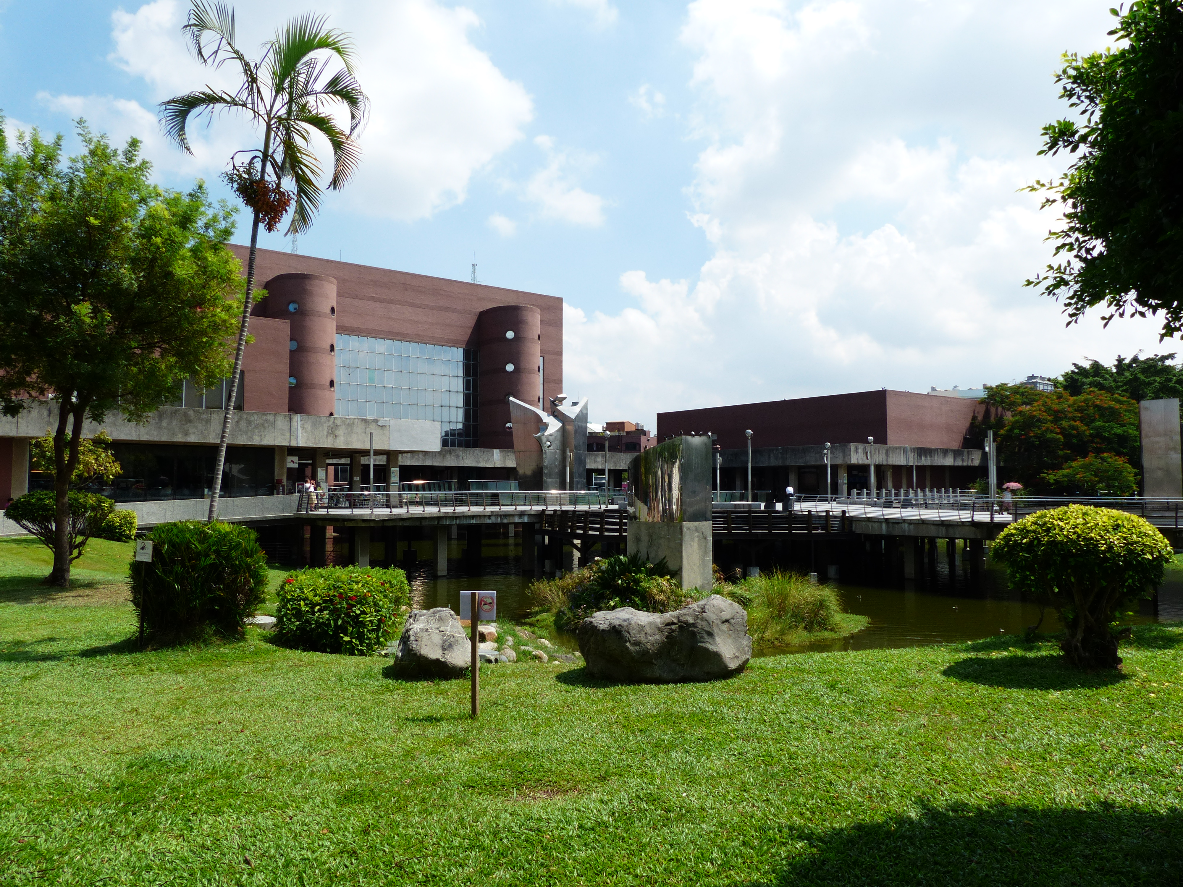 臺南市立文化中心前庭西池西南角往東北方眺望。